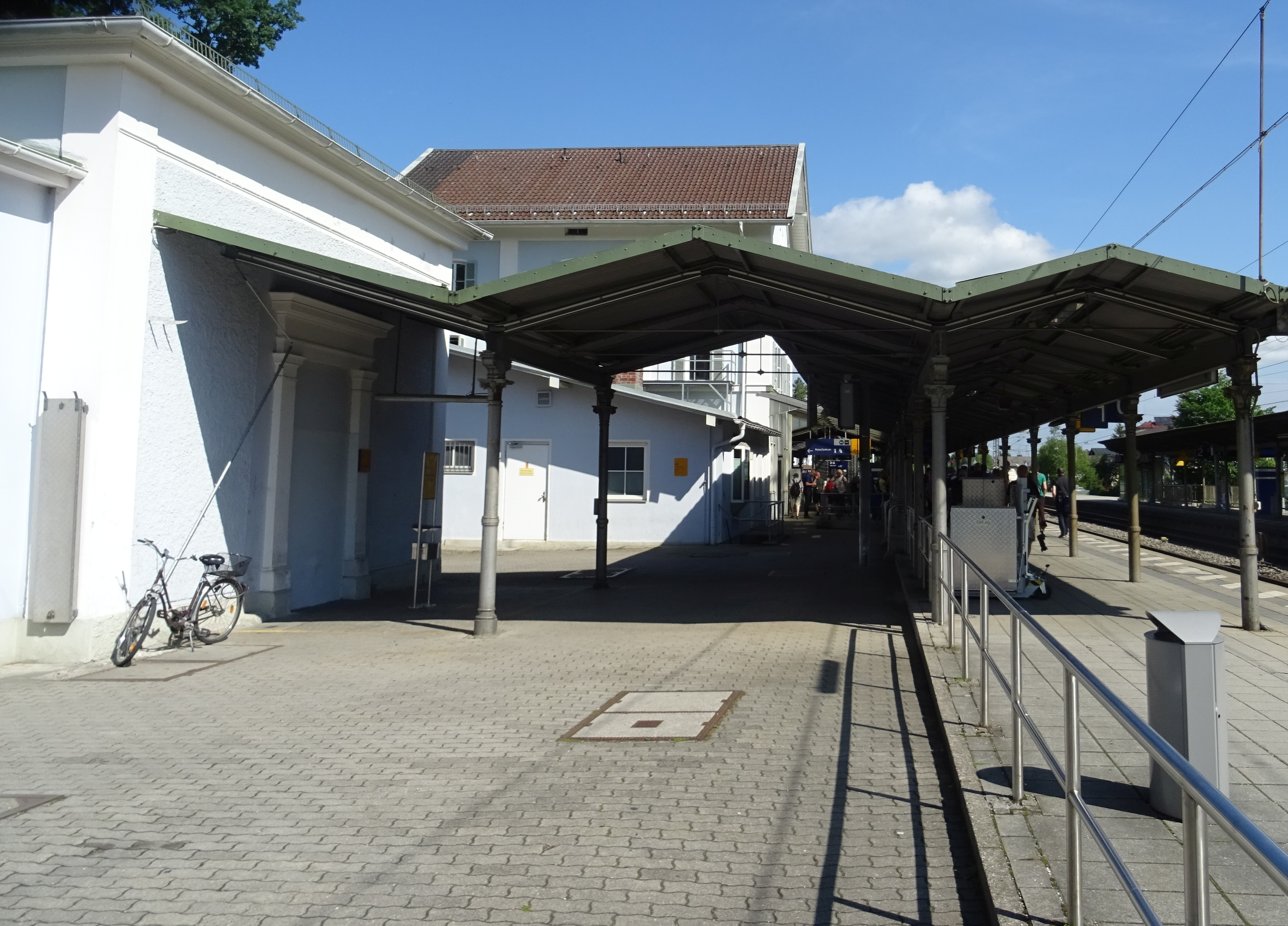 Bahnhof Prien a Chiemsee, denkmalgeschützter königlicher Pavillon und denkmalgeschützte Bahnsteigdächer